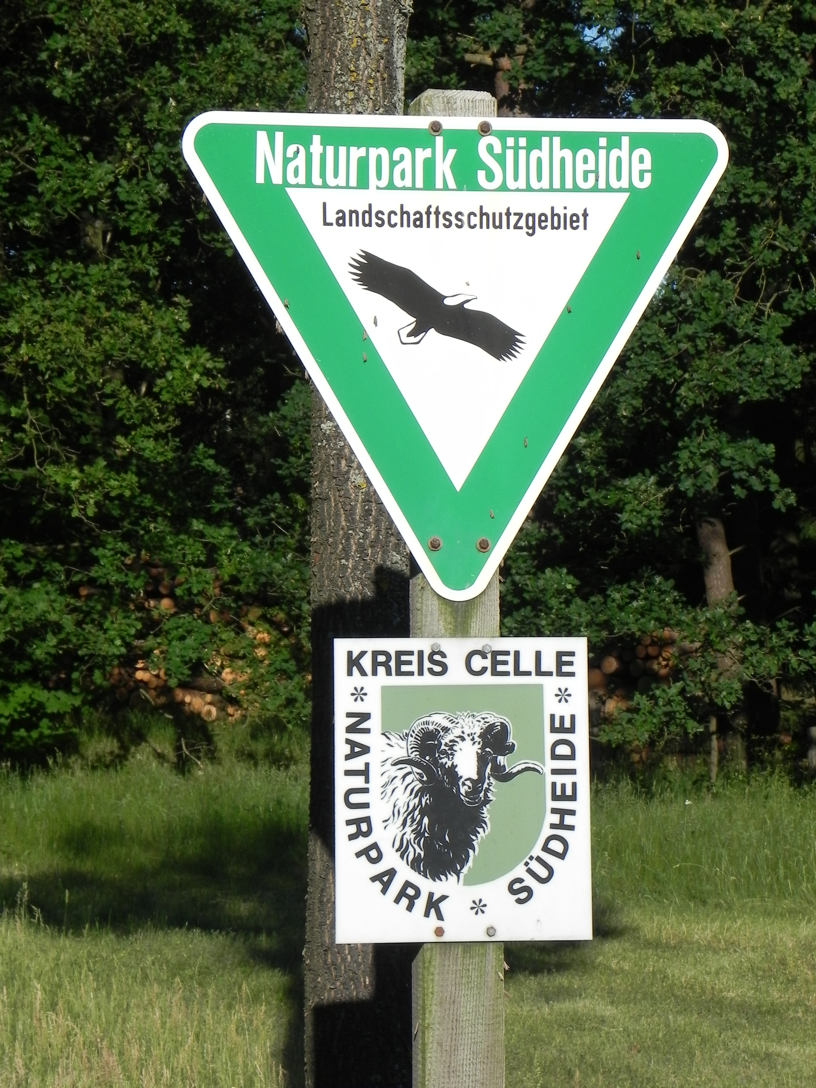 Hinweisschild Naturpark Südheide, Landschaftsschutzgebiet, Kreis Celle